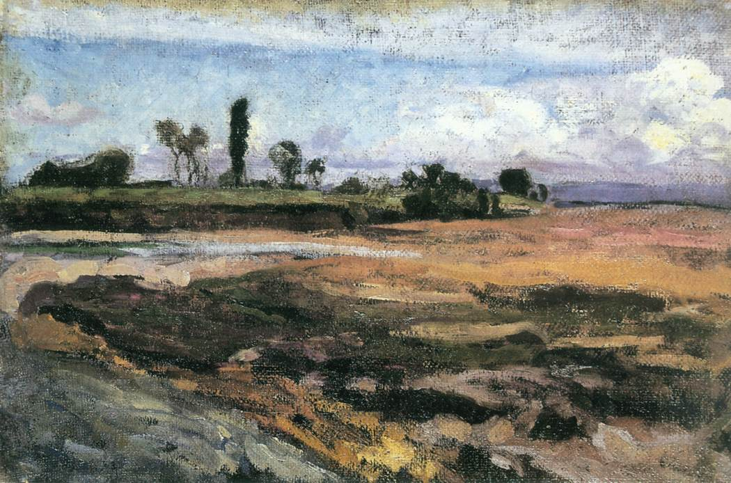 At river Zazar (A Zazar partján) Olaj, vászon, 40x60 cm. (Magyar Nemzeti Galéria)